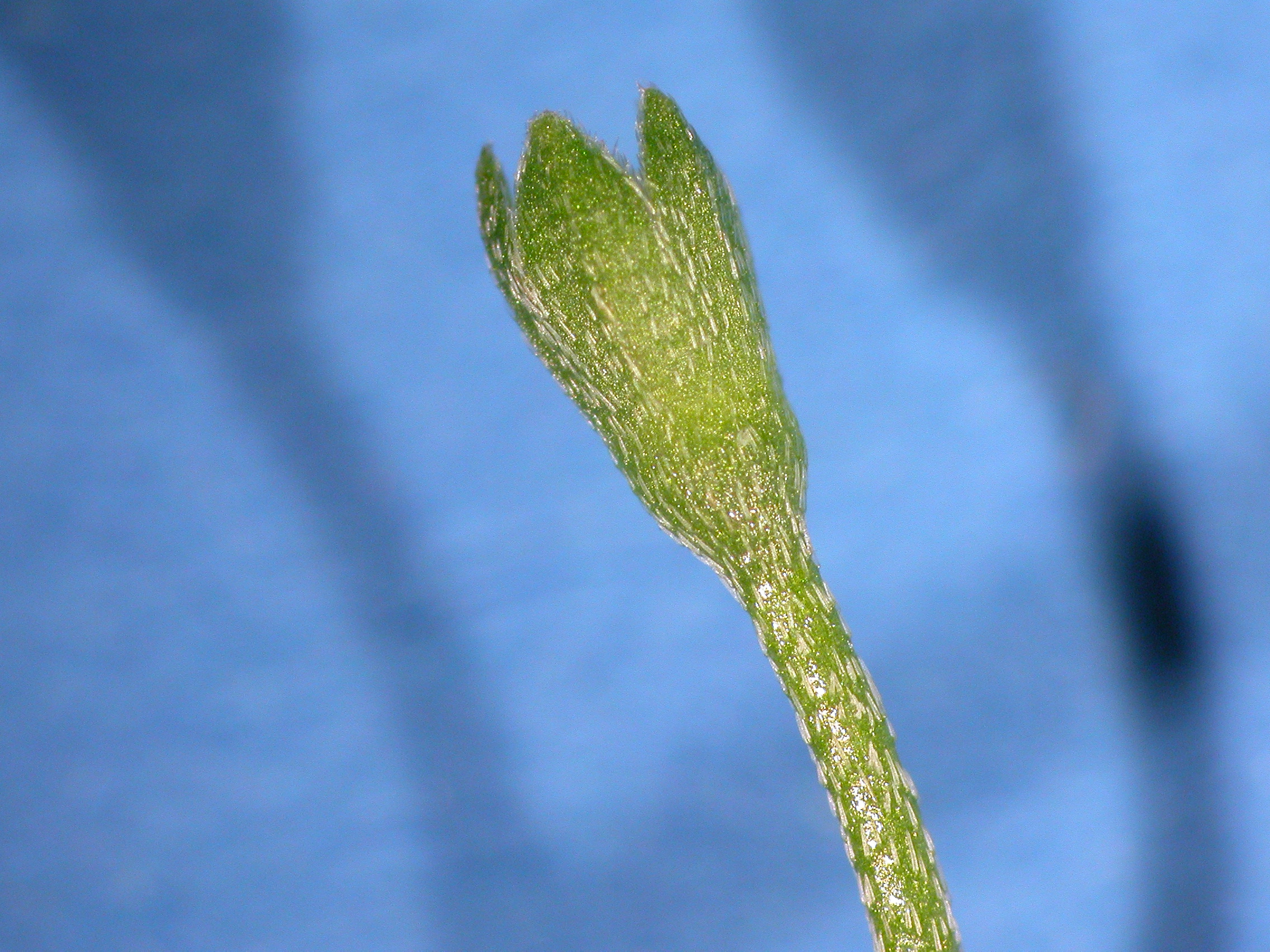 Myosotis scorpioides Marais de Blangy-Tronville (Somme), France